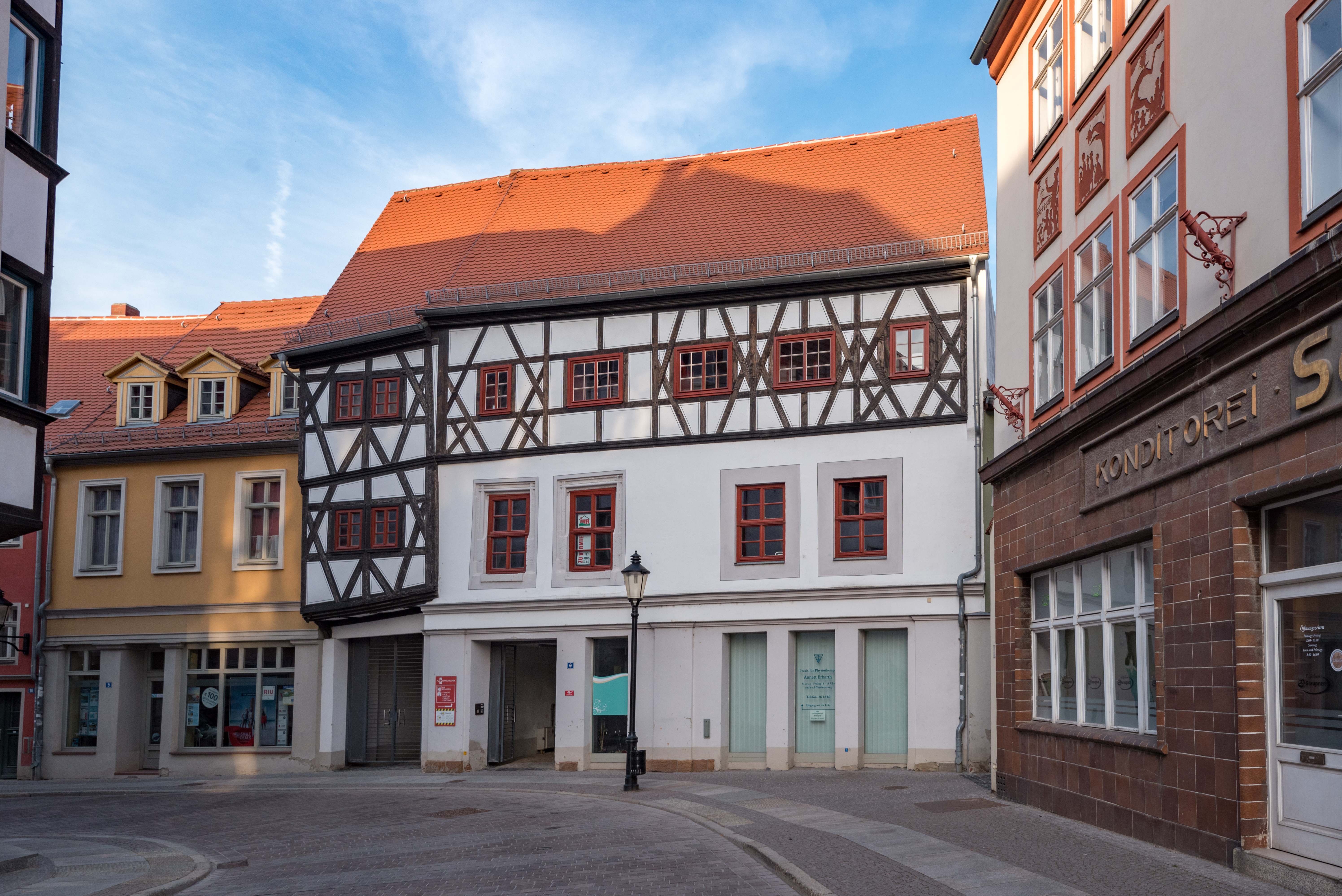 Naumburg (Saale), Marienstraße 8